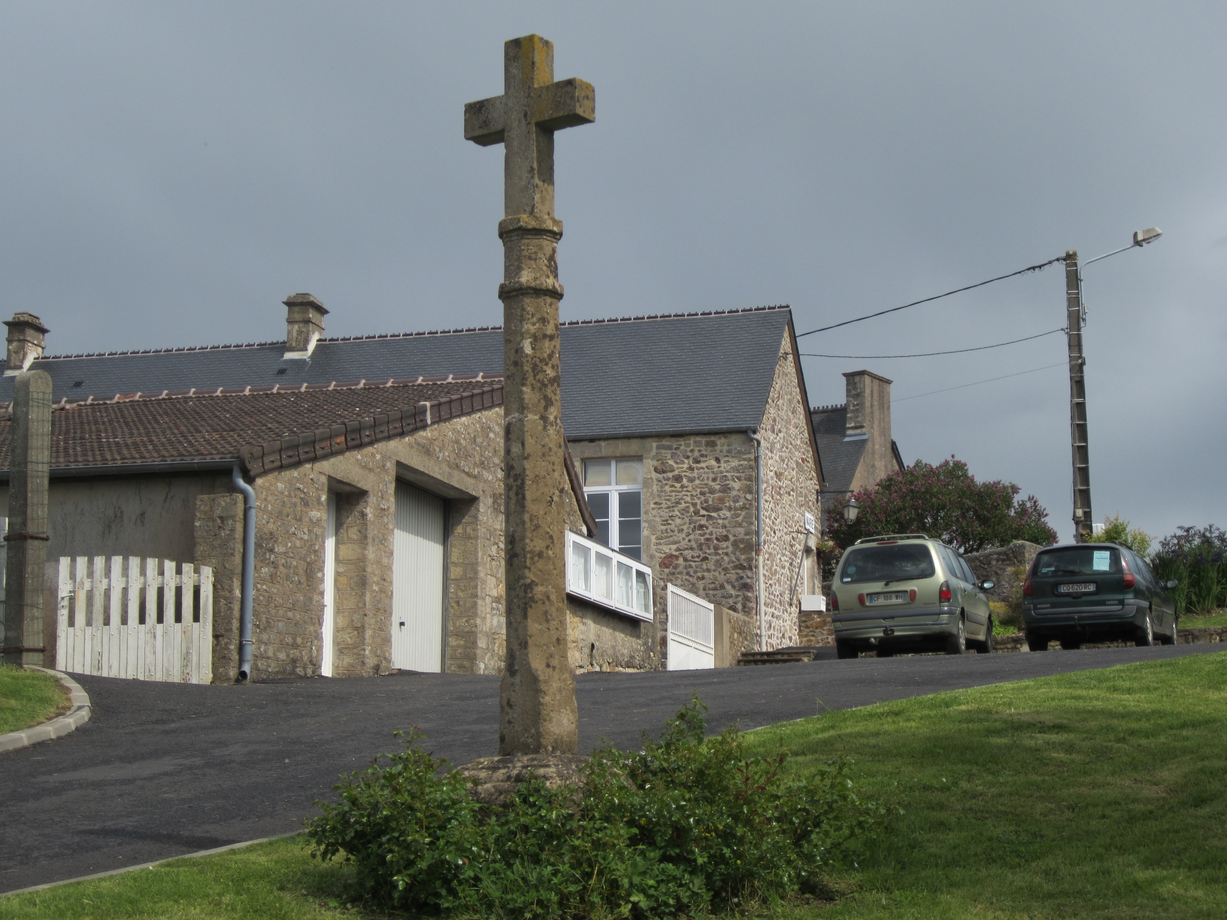 Huberville, Manche